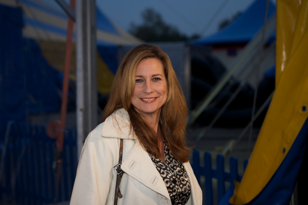 Nederlands actrice Carine Crutzen